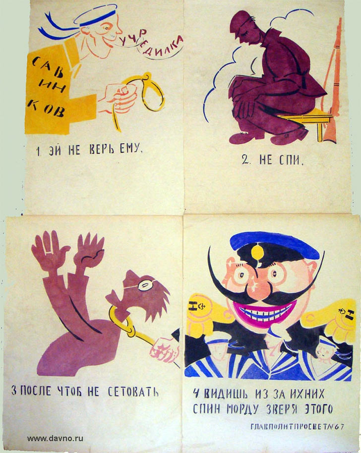 Плакат "Эй, не верь ему..." Главполитпросвет, No 67, март 1921